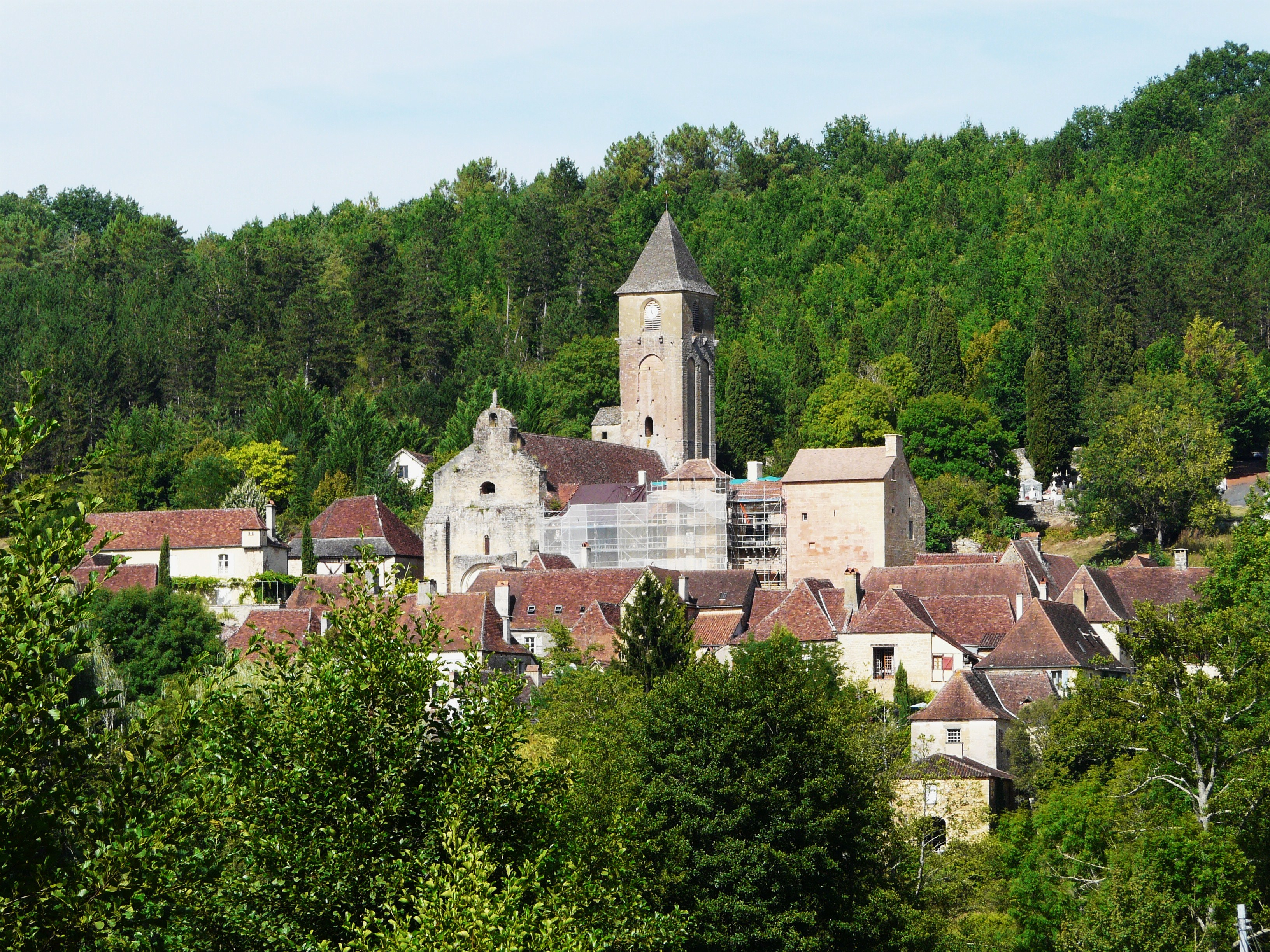 Le village de Plazac, Dordogne, France.